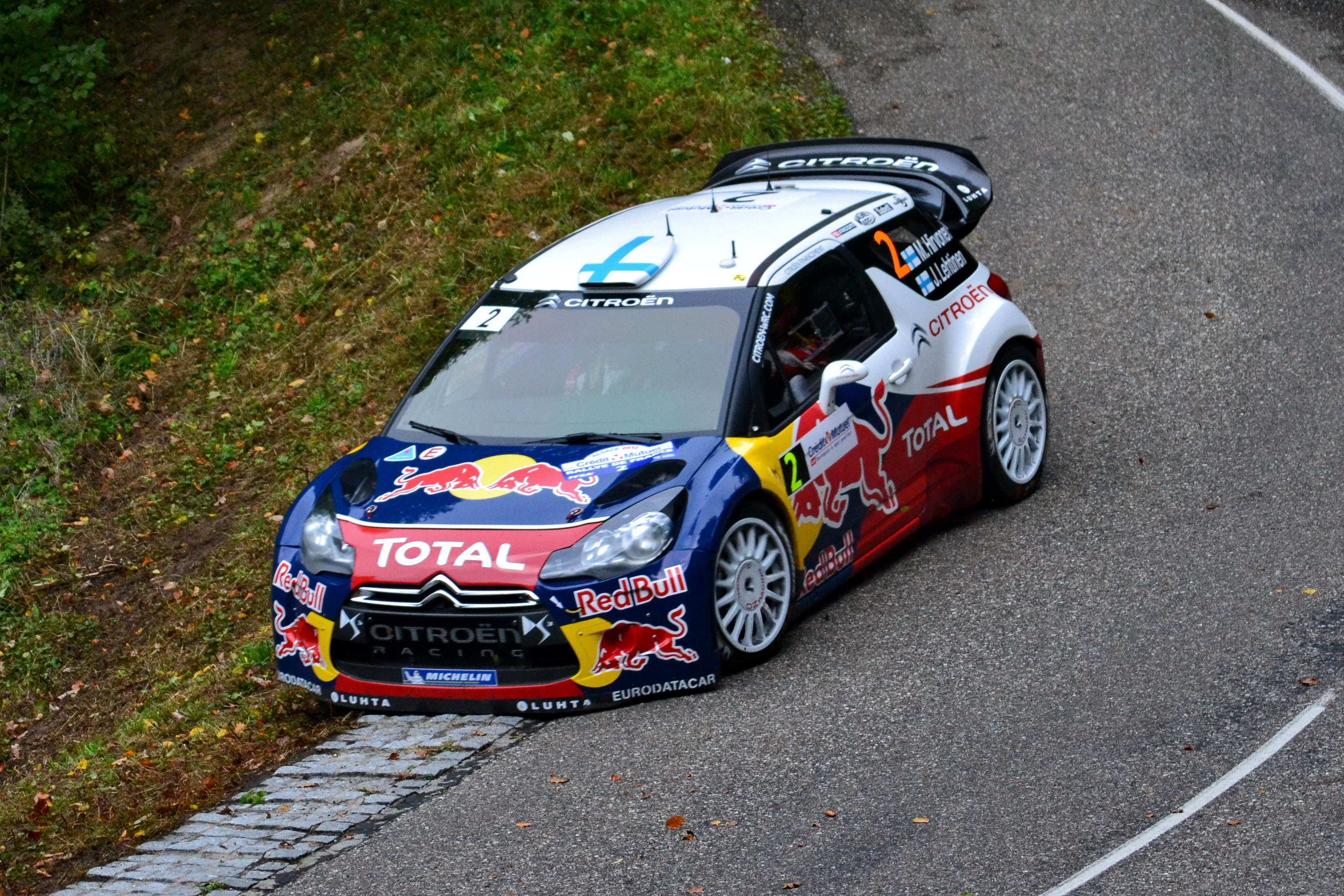 Rallye WRC France-Alsace 2012, ES2 Hohlandsbourg-Firstplan 1. Citroën DS3 WRC - Mikko Hirvonen/J. Lehtinen